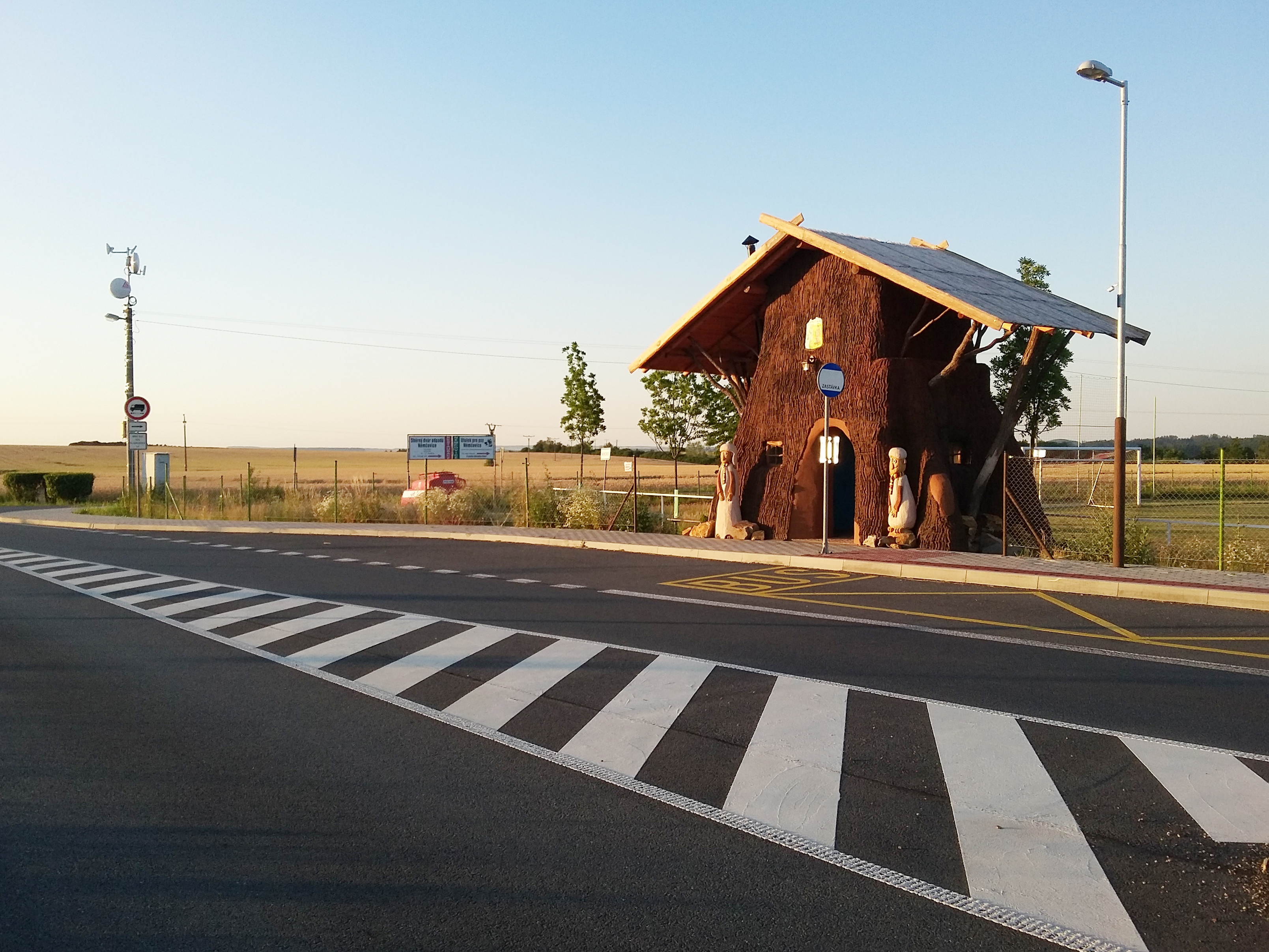 Zastávka autobusu je ztvárněna jako Pařezová chaloupka skřítků Křemílka a Vochomůrky